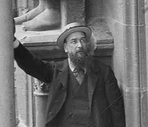 sur une vue ancienne.